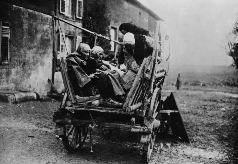 Westfront, Bauern auf der Flucht Westfront. Französische Landleute auf der Flucht